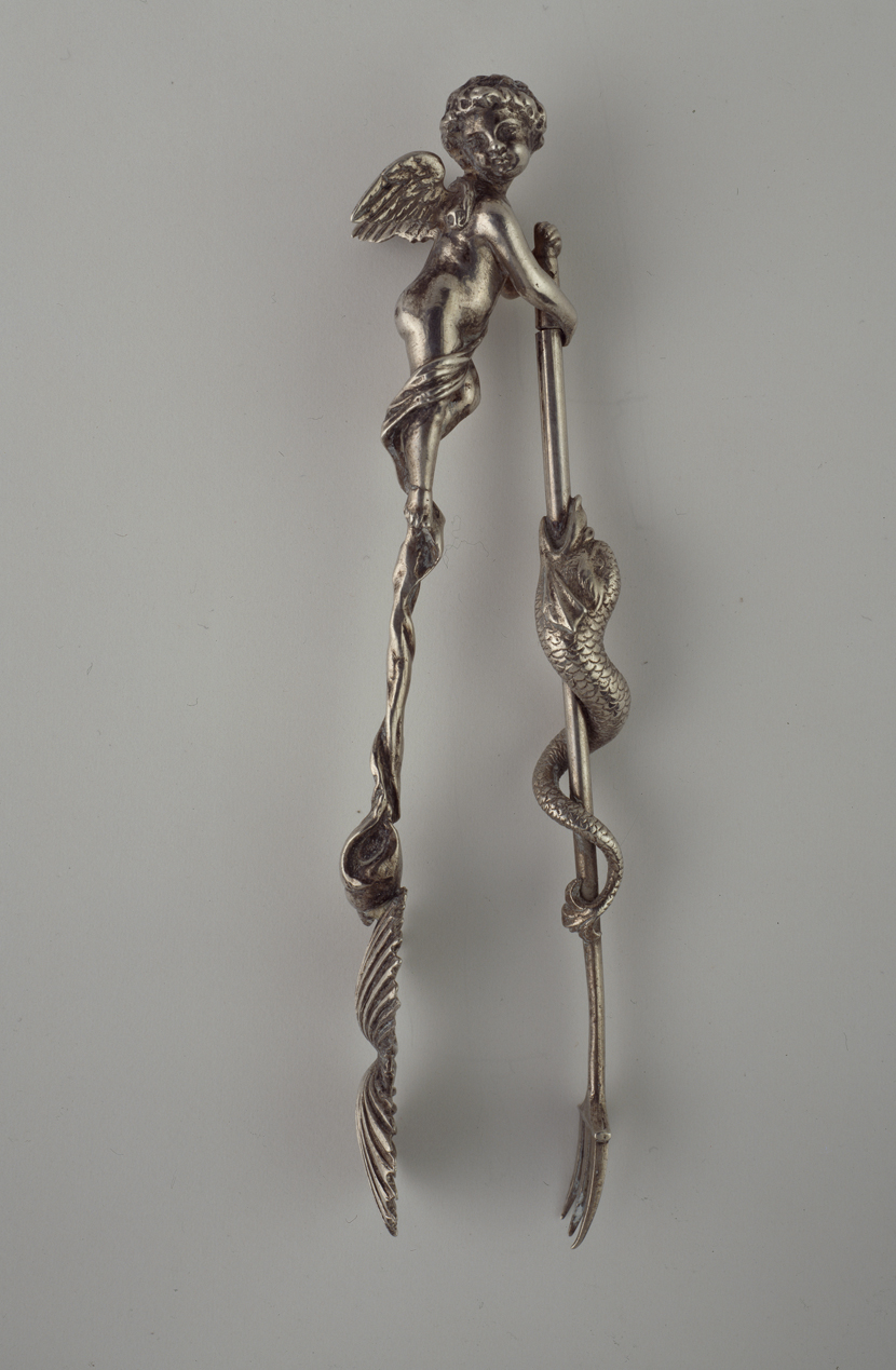 Colección de cucharas y utensilios de Ernesto Richheimer, perteneciente al Museo Soumaya.